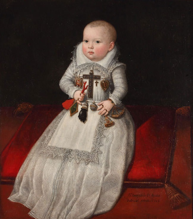 Retrato de la infanta Ana Mauricia de Austria (1601-1666), que fue hija del rey Felipe III de España y reina consorte de Francia por su matrimonio con Luis XIII.